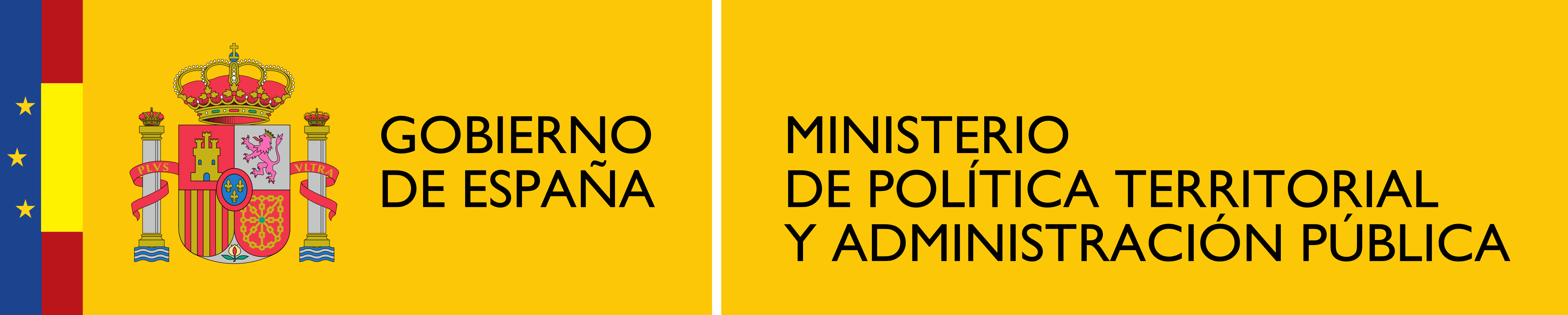 Logotipo del Ministerio de Política Territorial y Administración Pública